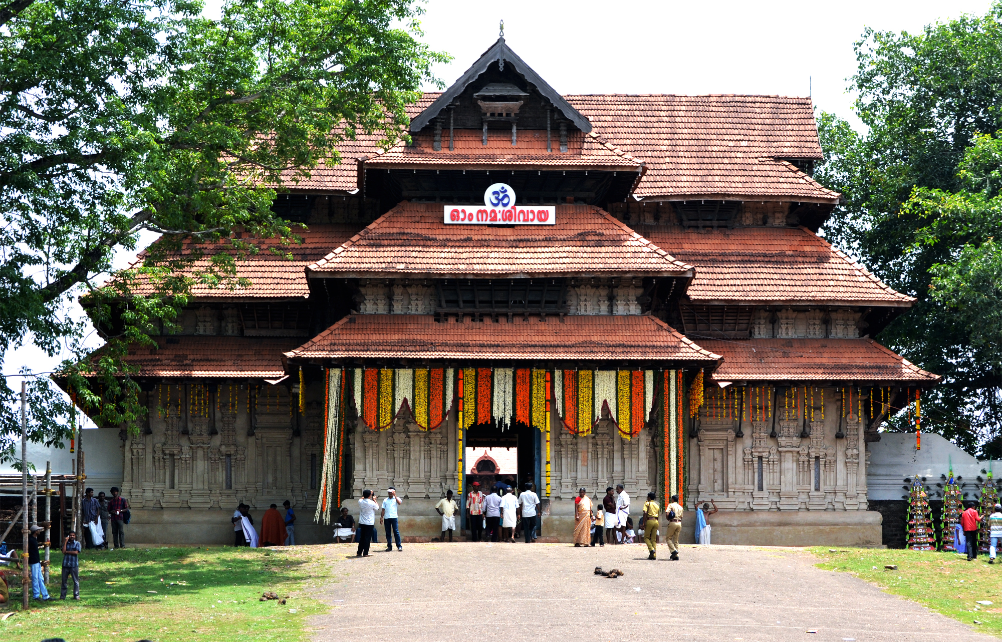 വടക്കുംനാഥ ക്ഷേത്രം തെക്കേ ഗോപുരനട